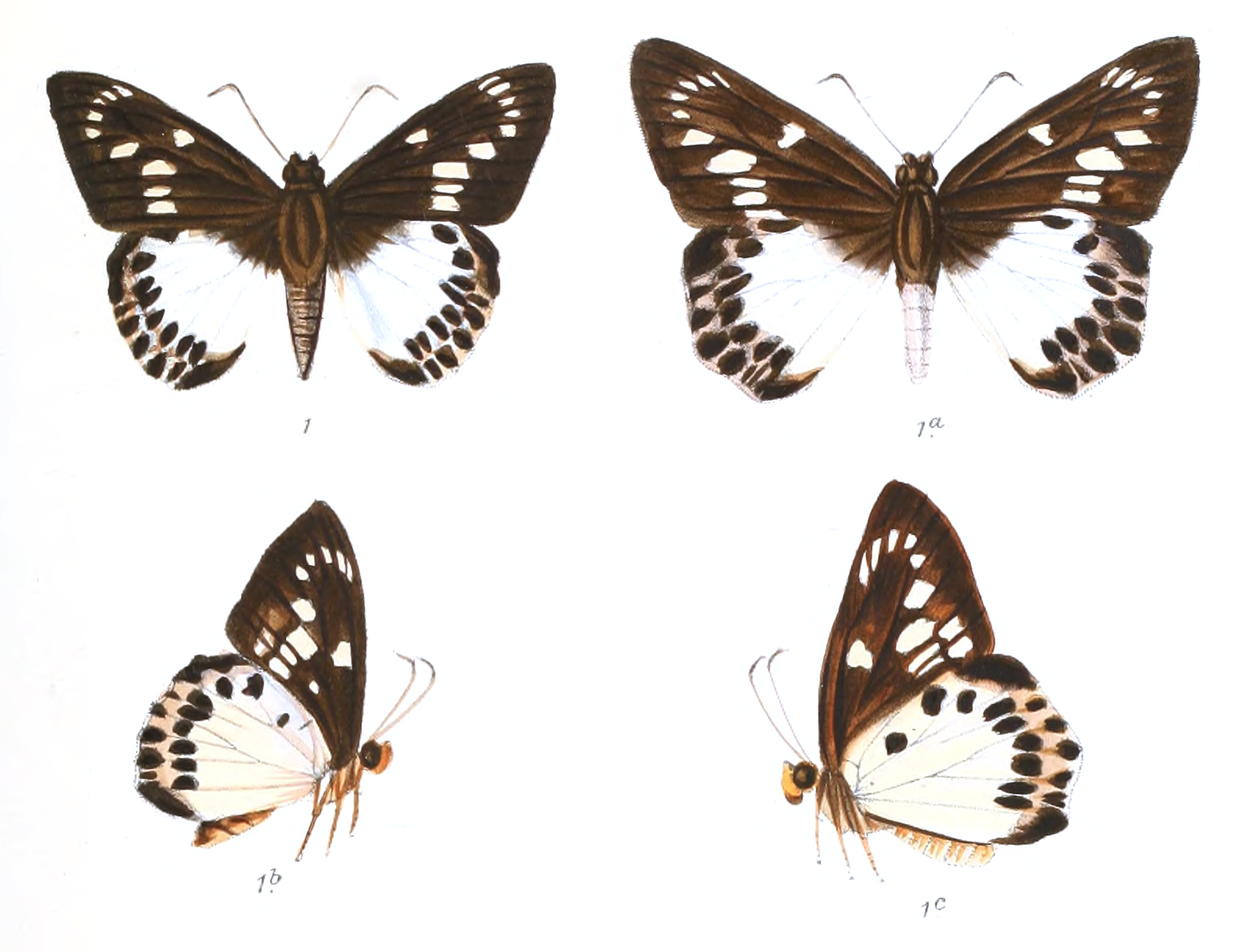 Satarupa gopala (male and female)